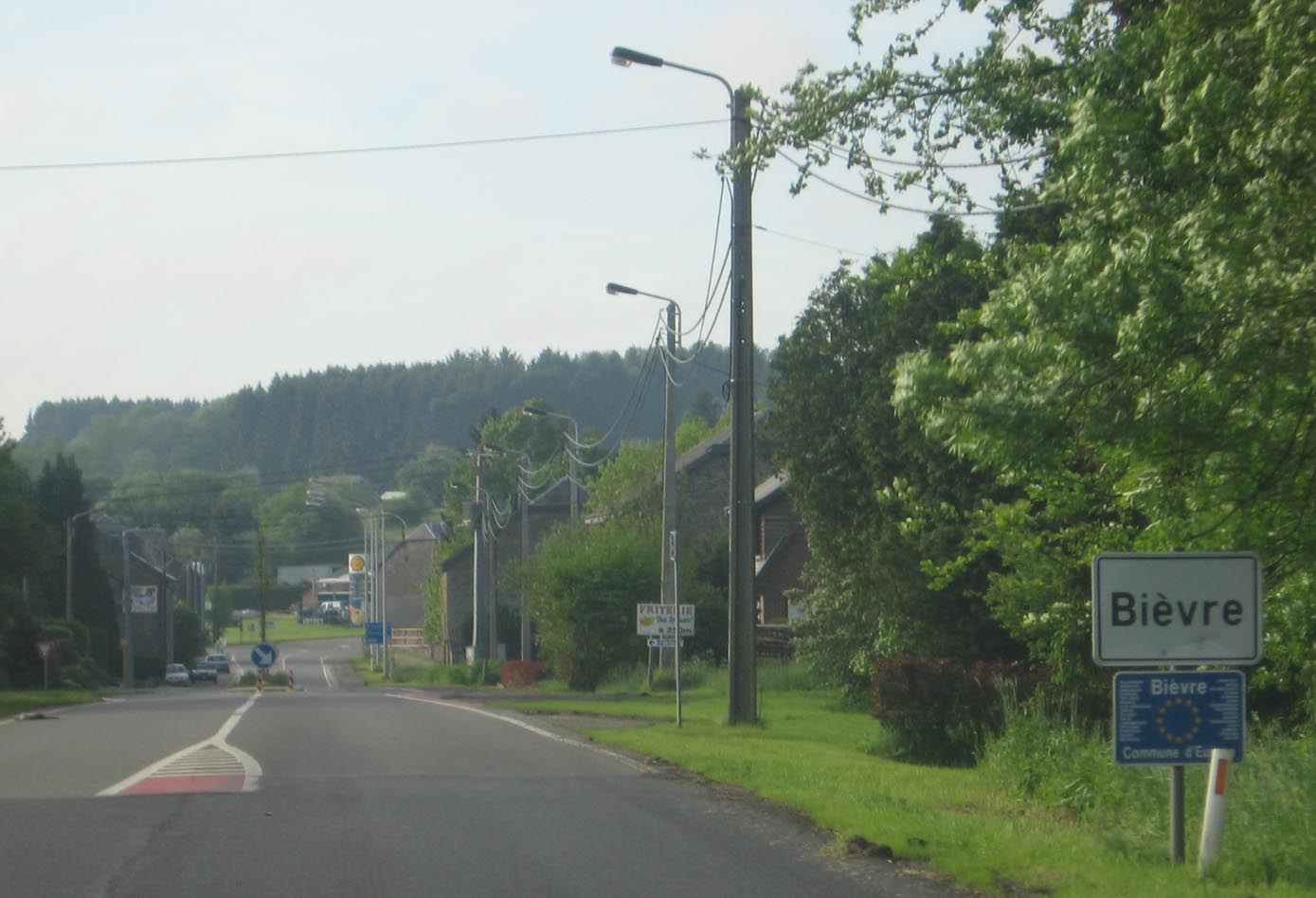 Bievre